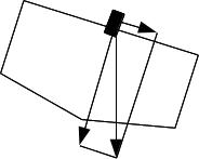 Žirokompasa zvalstīšanās kļūdas paskaidrojumam.